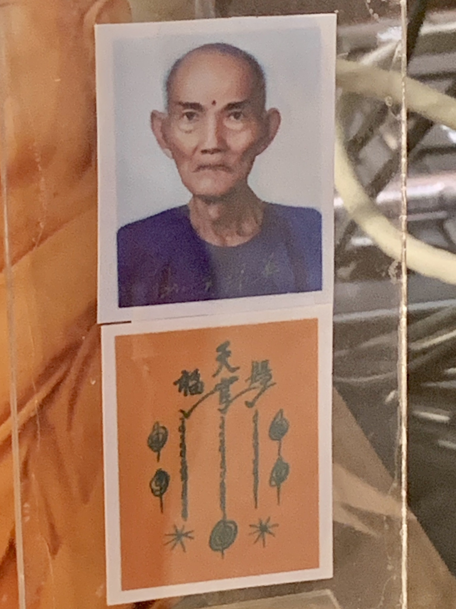 อาจารย์โง้ว กิมโคย (นที ทองศิริ) เซียนแปะโรงสี